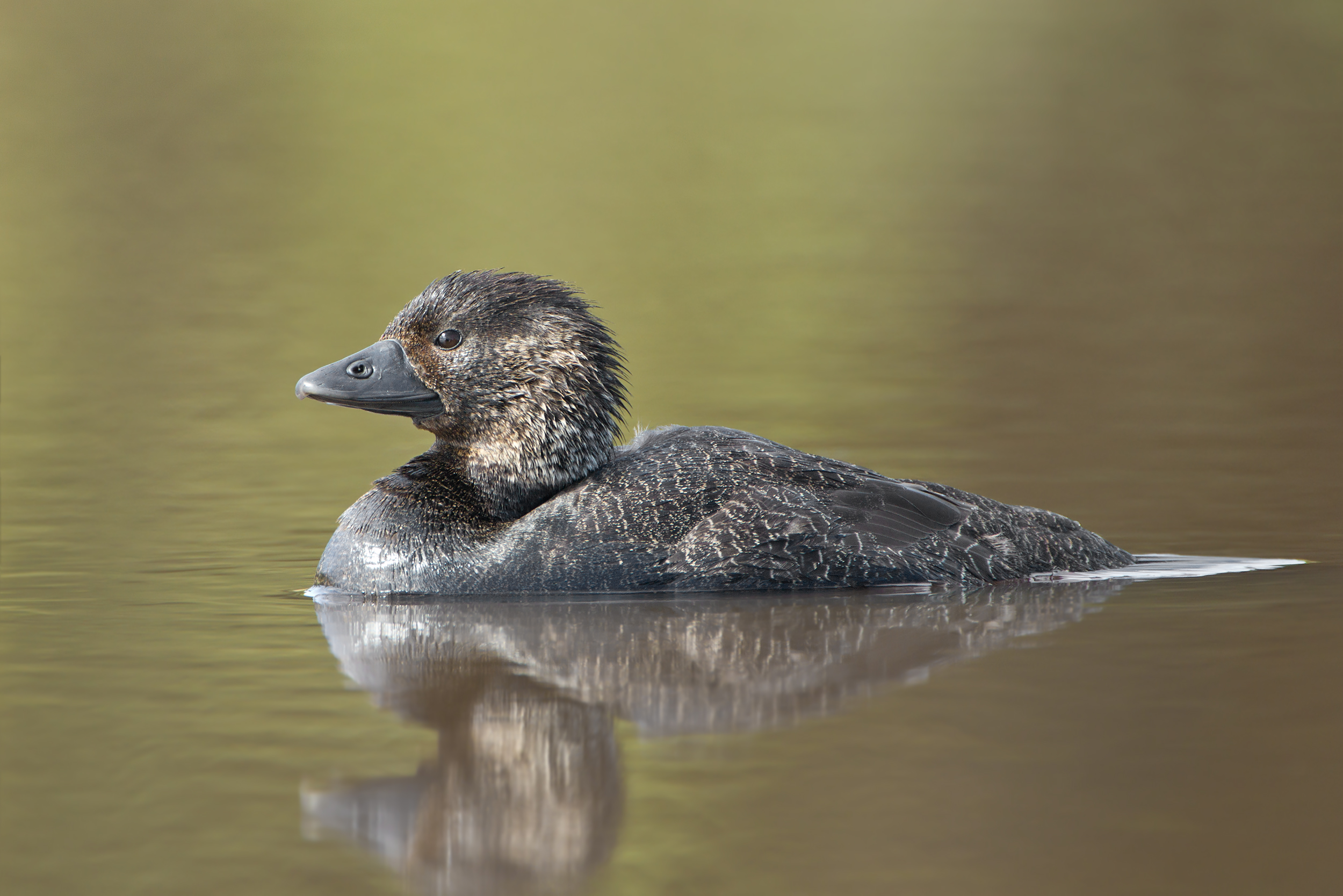 Musk Duck (Biziura lobata) female, Sandford, Tasmania, Australia